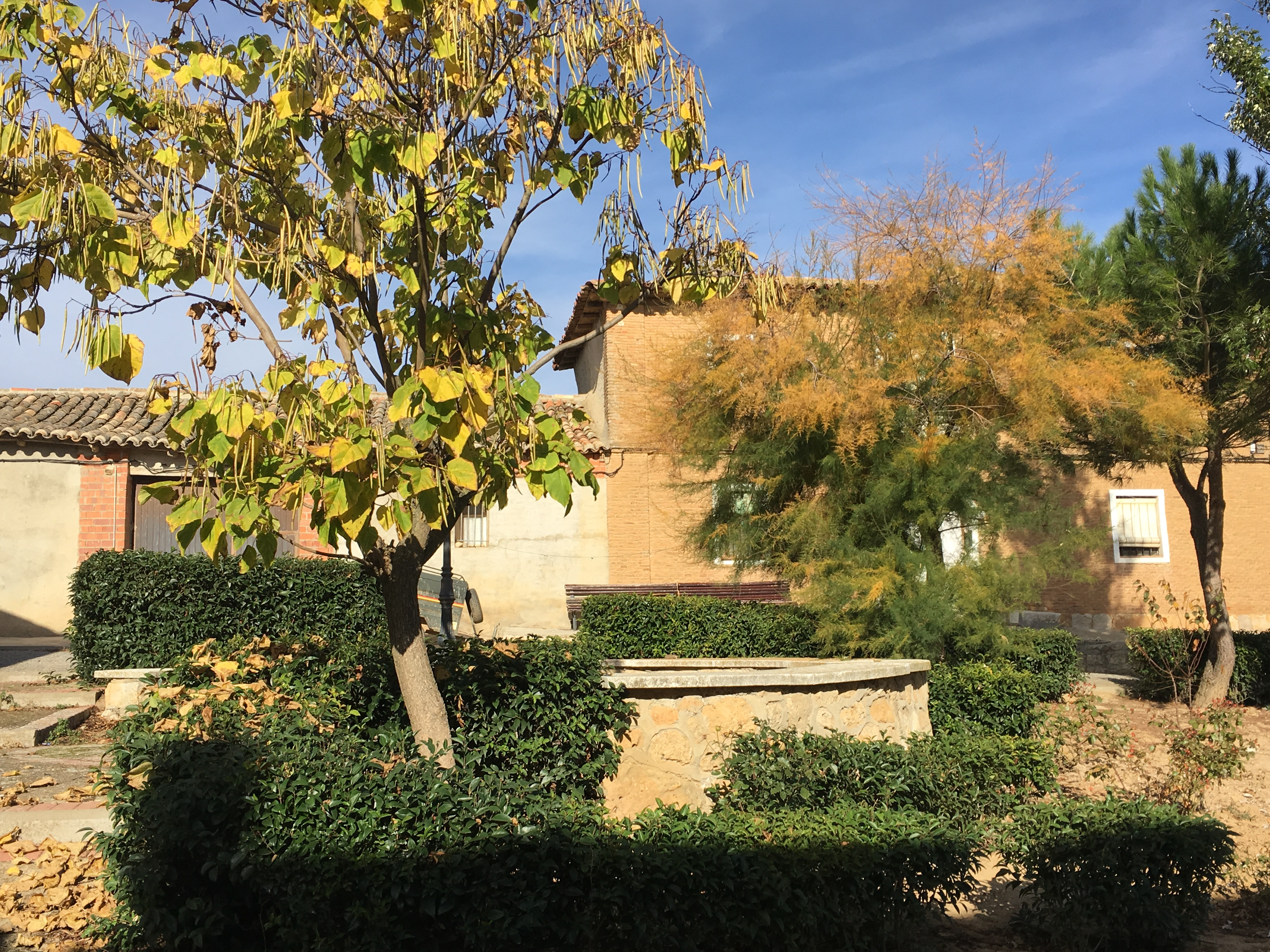 Villaesper Milenario